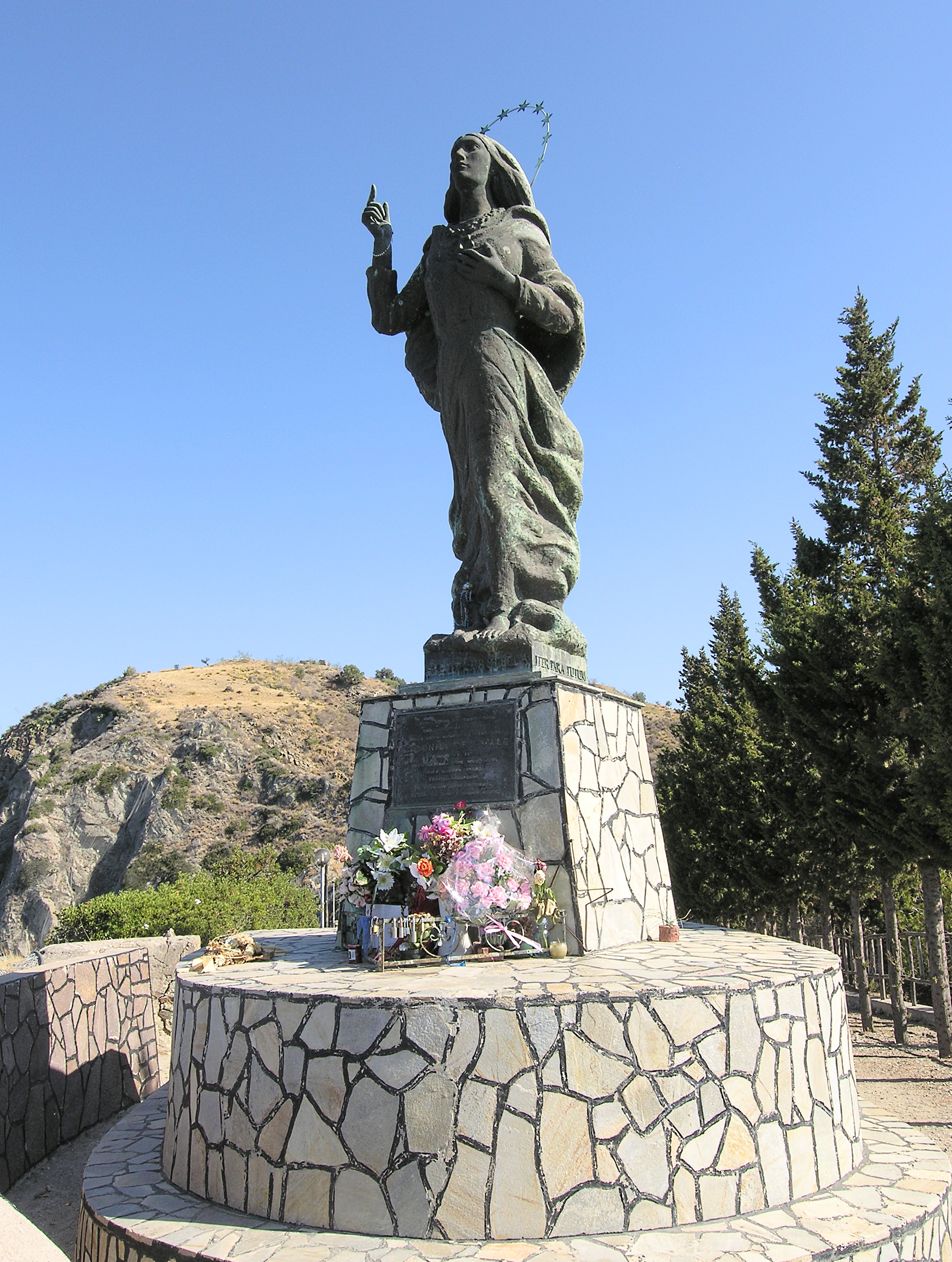 Statua bronzea della Madonna del Mare (Stella Maris) - Capo San Giovanni D'Avalos (Rocca del Capo) - Bova Marina